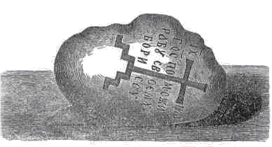 Борисов камень у Полоцка.